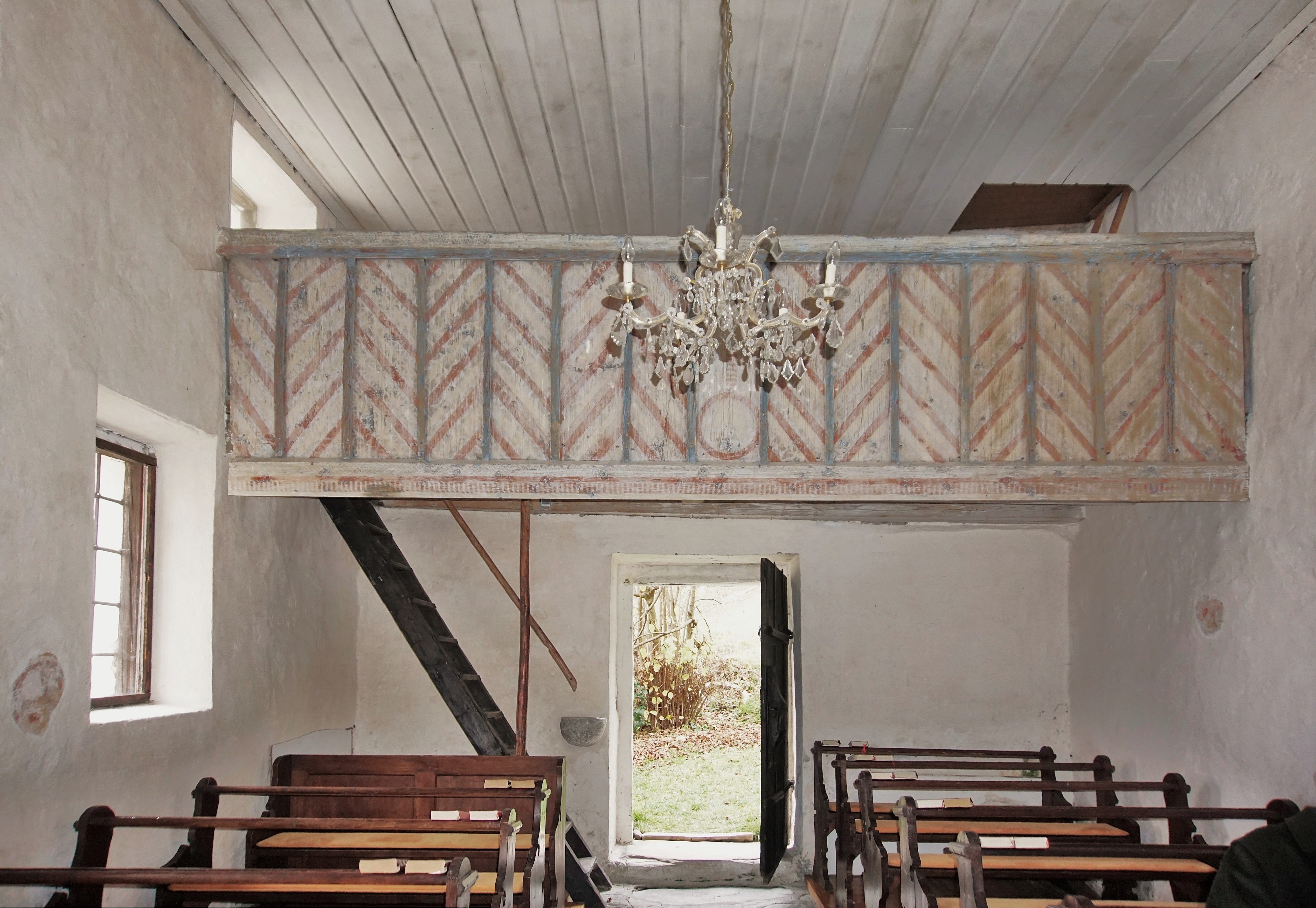 Kath. Filialkirche Nußberg (Moosburg), die Empore